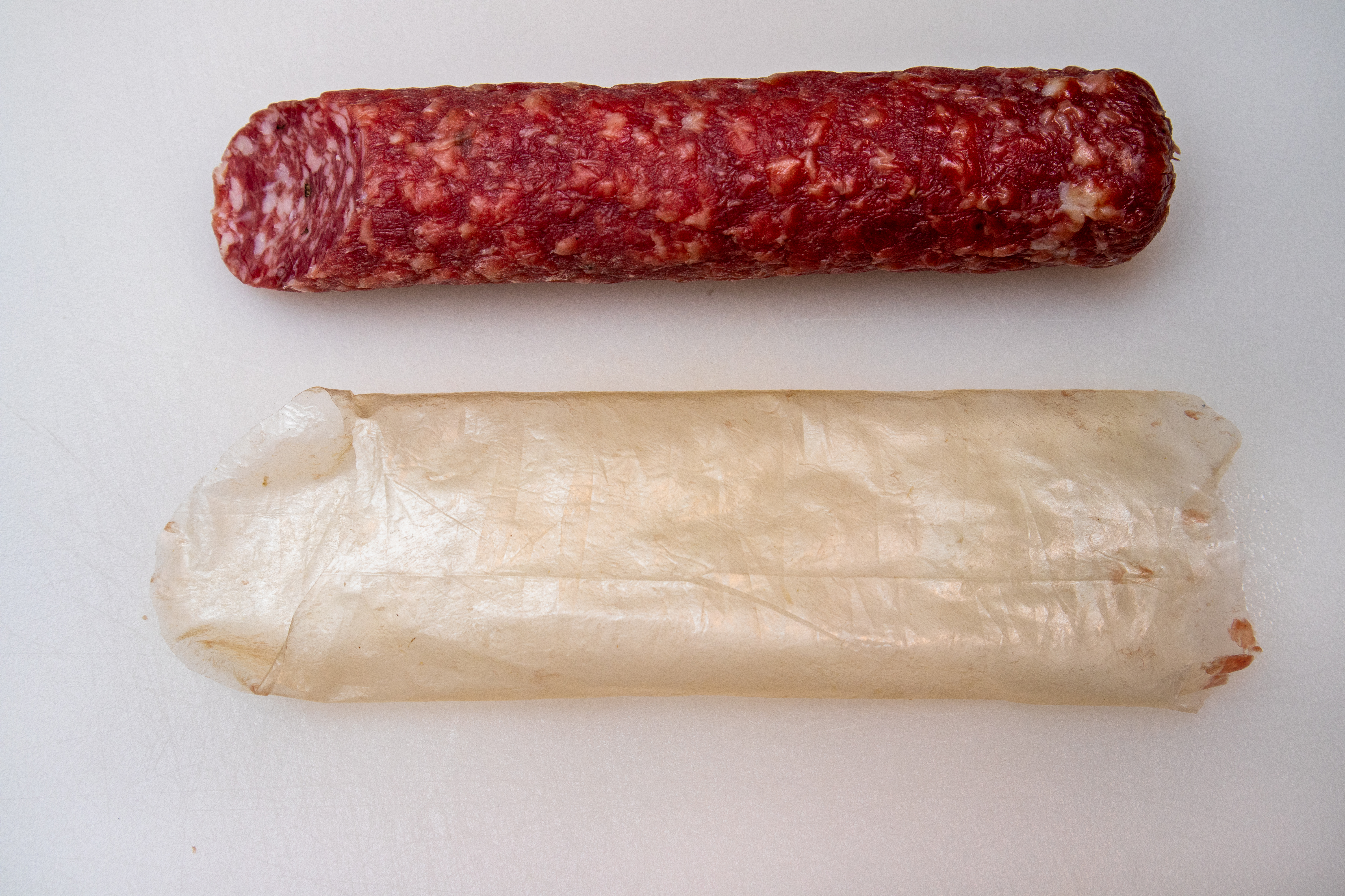 Salami (Fratelli Beretta brand Nostrano Salami) and the collagen casing it came in.